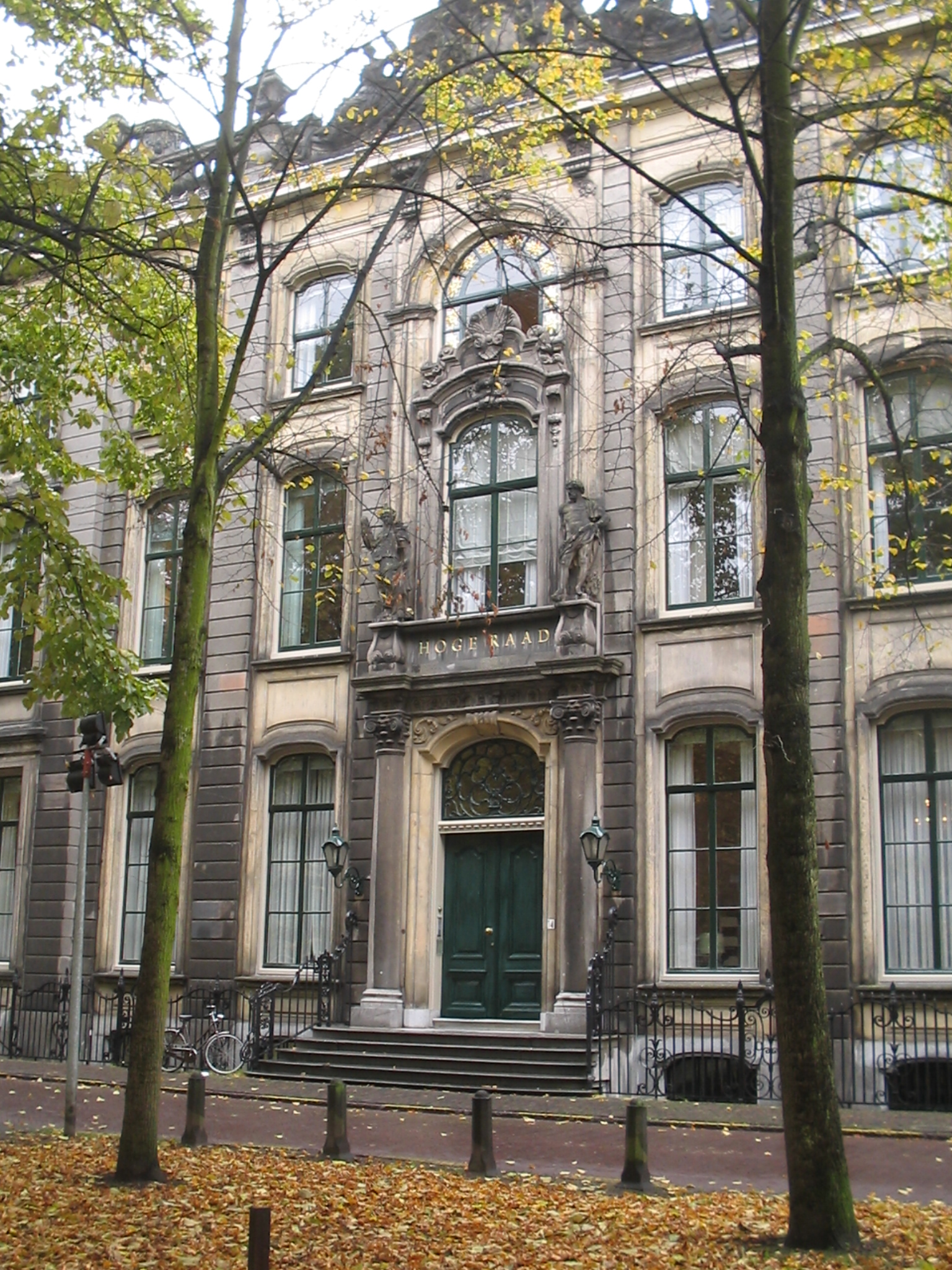 Hoge Raad, Lange Voorhout, Den Haag, Netherlands, 21 oktober 2005